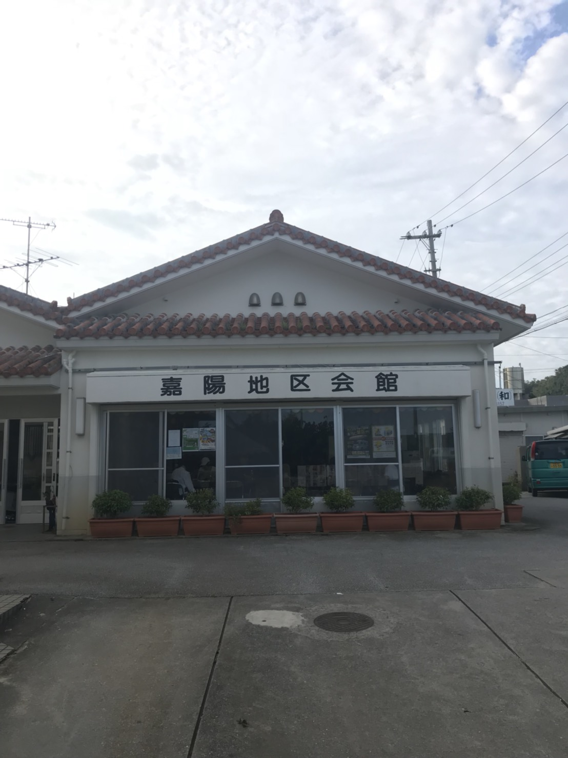 嘉陽地区会館の外観